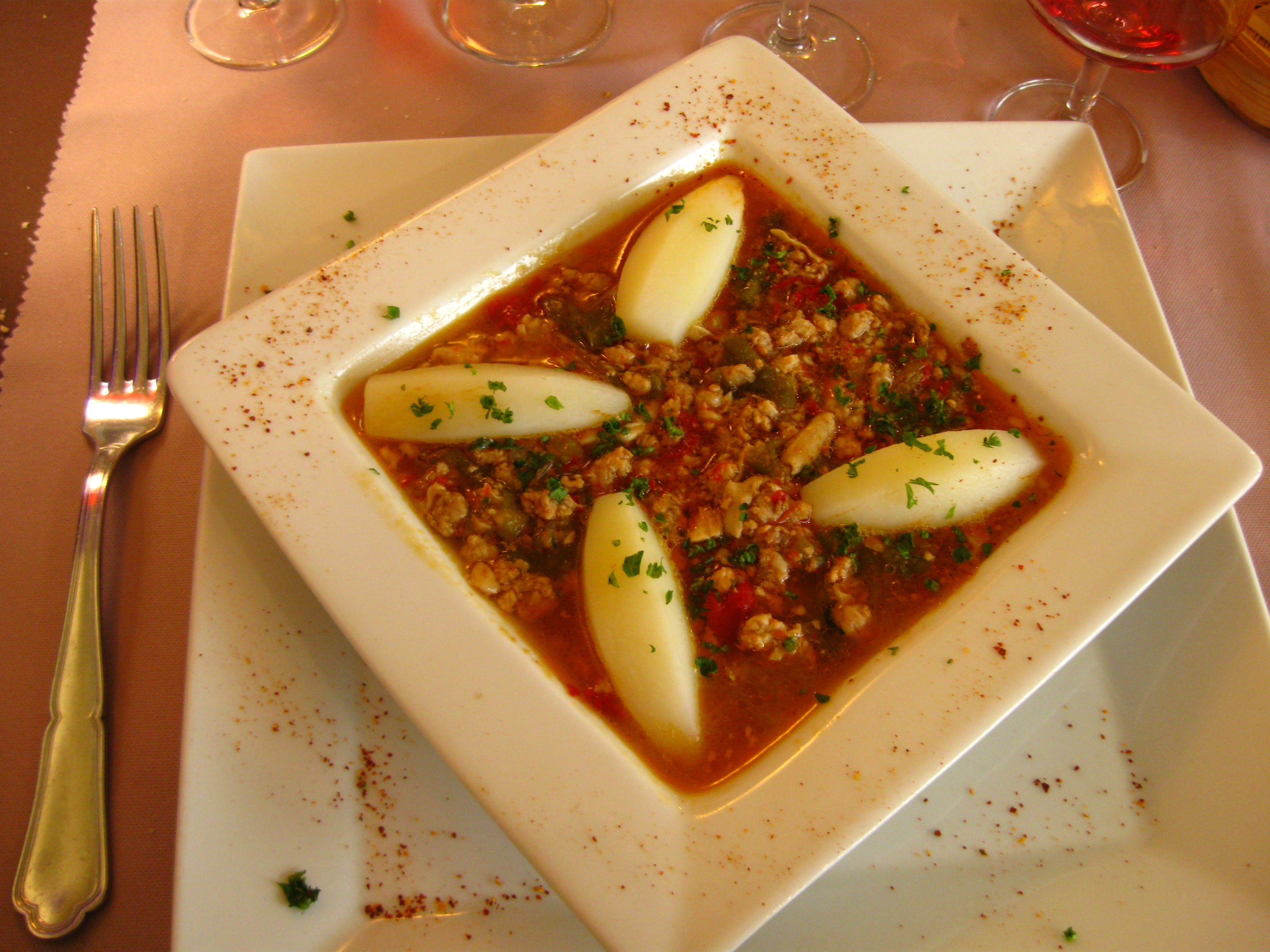 l'axoa de l'auberge Irribaren à Biriatou.